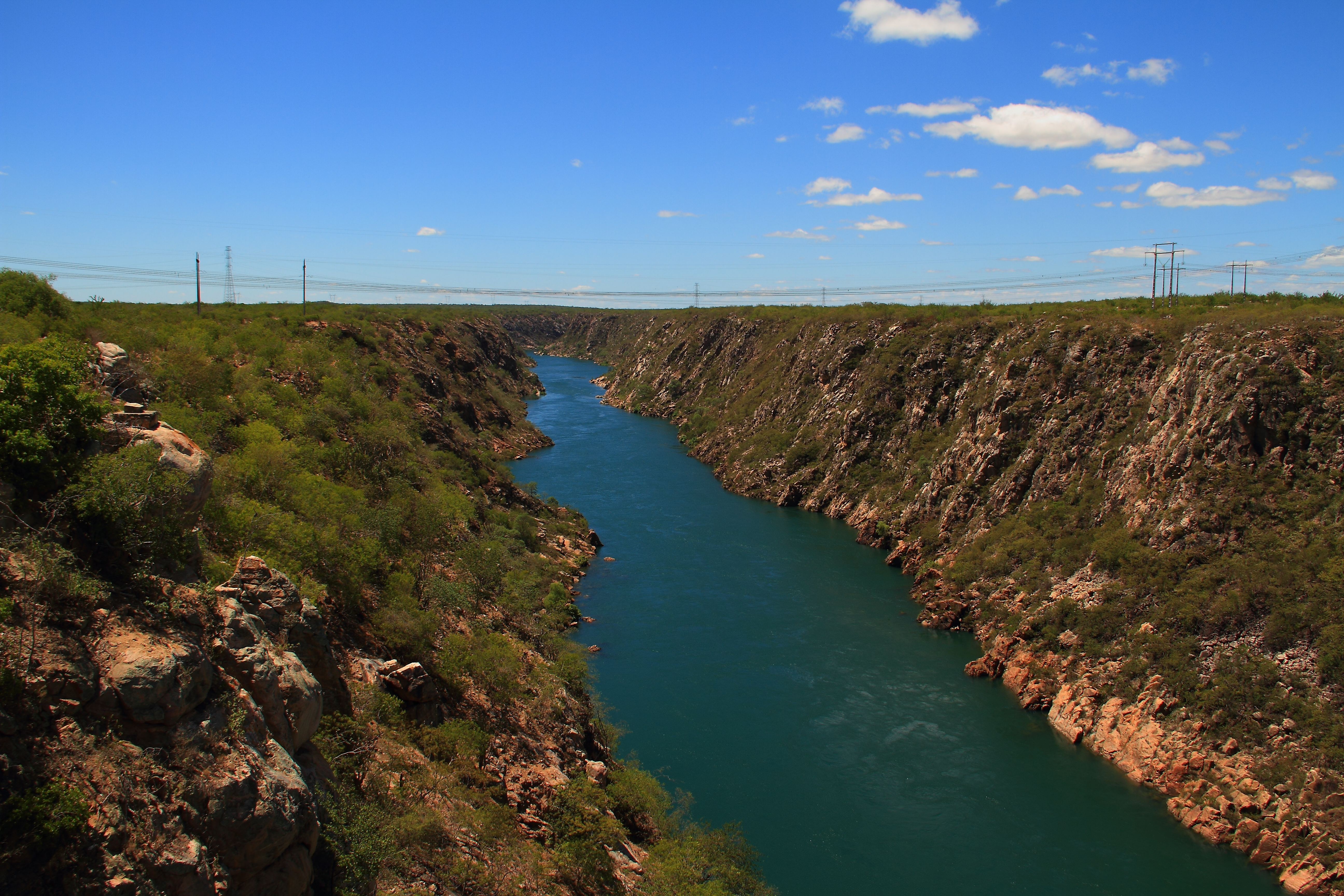 Rio Sao Francisco próximo a Paulo Afonso divisa BAHIA-ALAGOAS.jpg